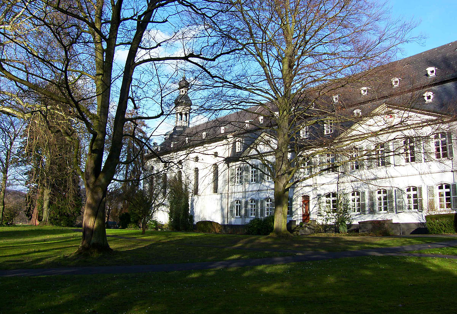 Das Hauptgebäude des Inselklosters Nonnenwerth